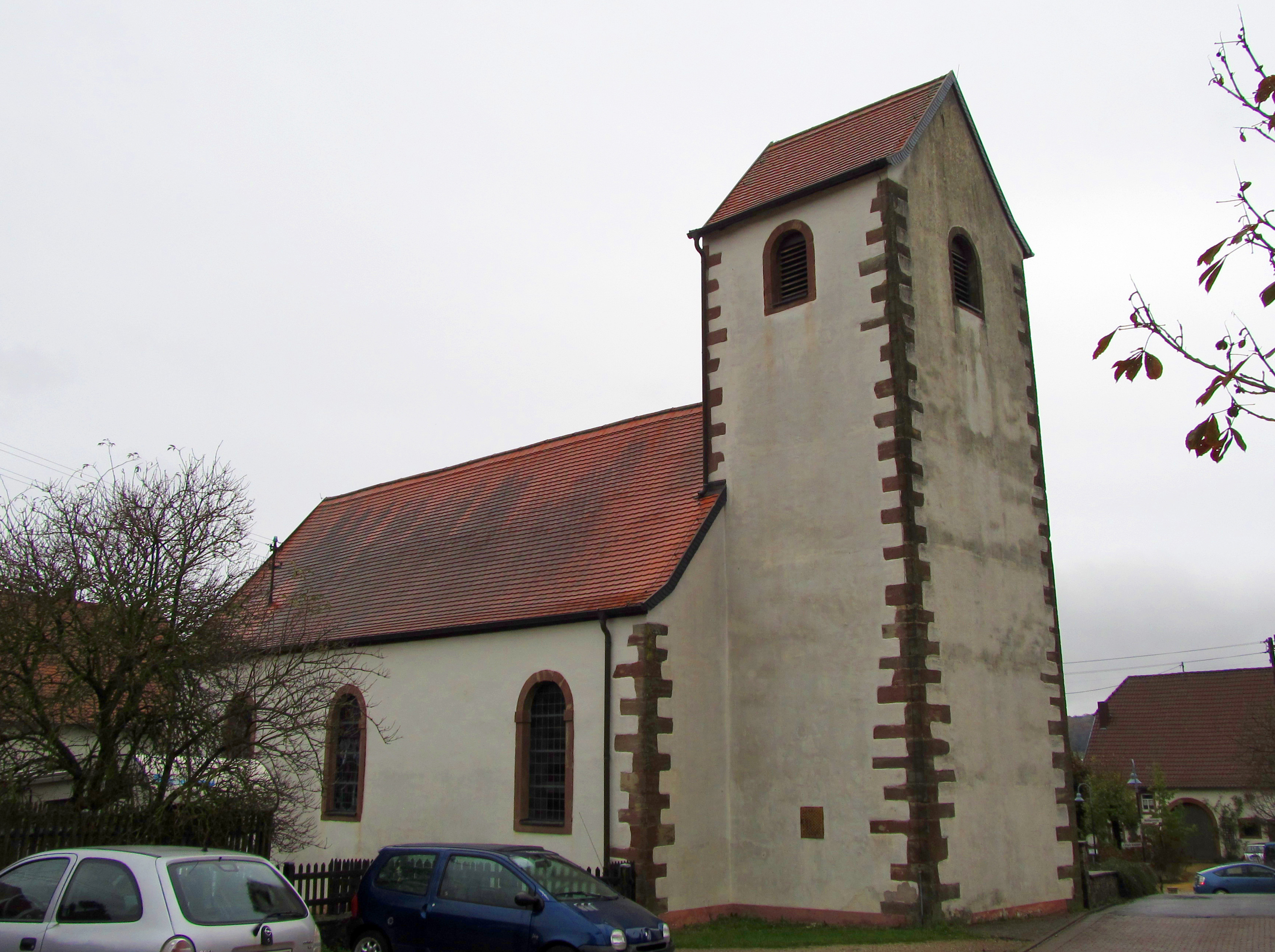 Die protestantische Kirche in Wolfersheim, einem Stadtteil von Blieskastel, Saarland